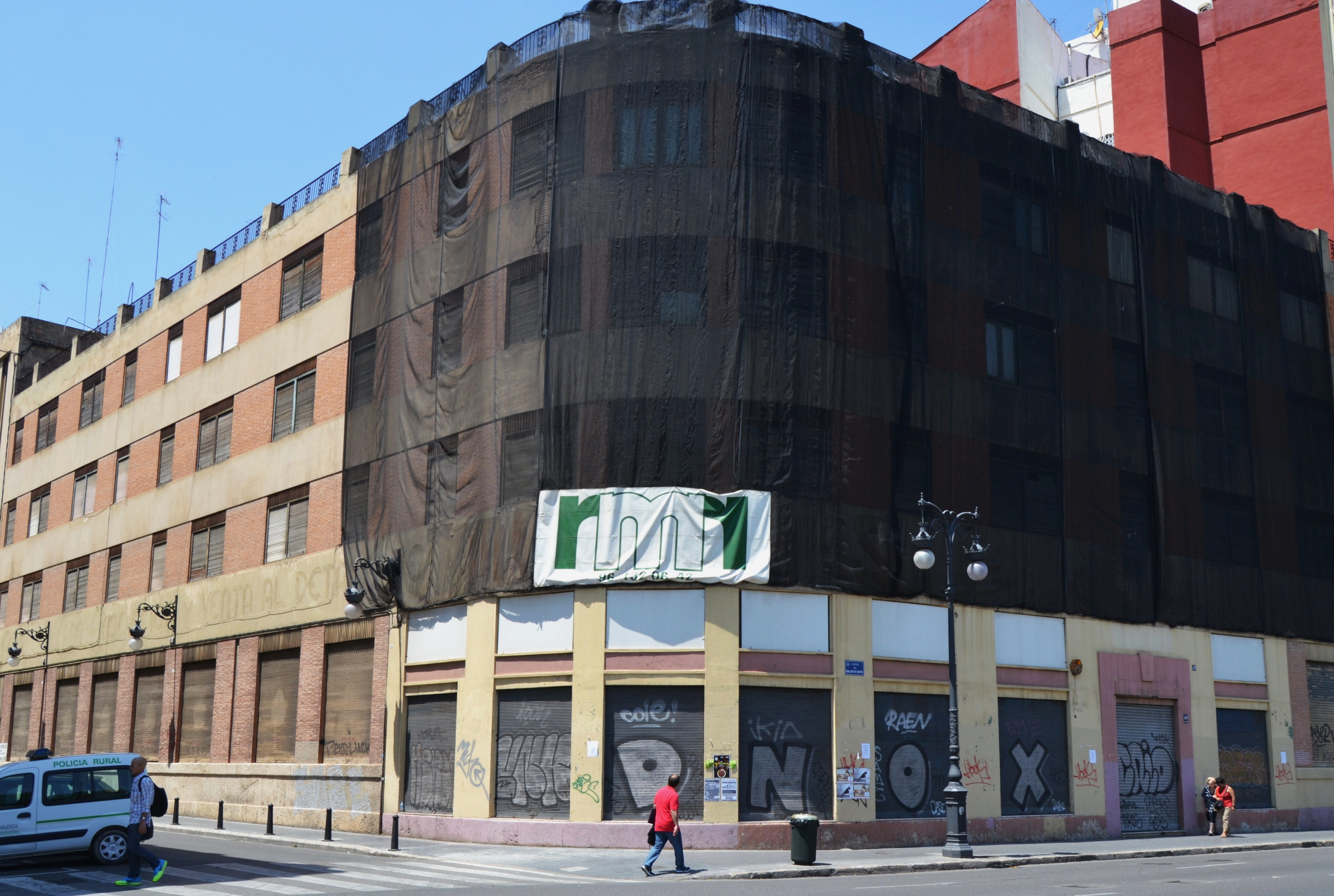 Edifici Cuadrado o Casa Russa, València.